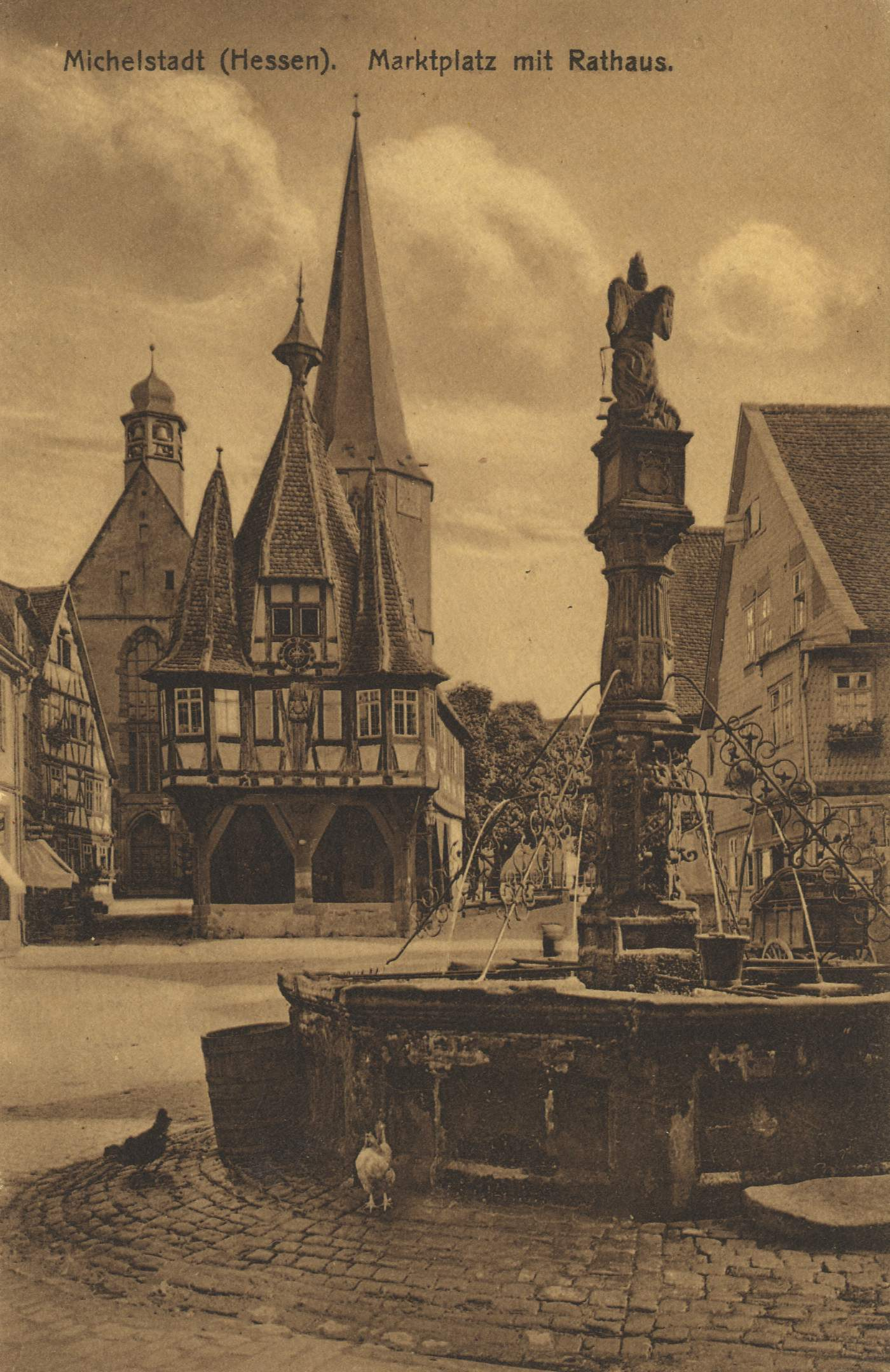 Marktplatz mit Rathaus